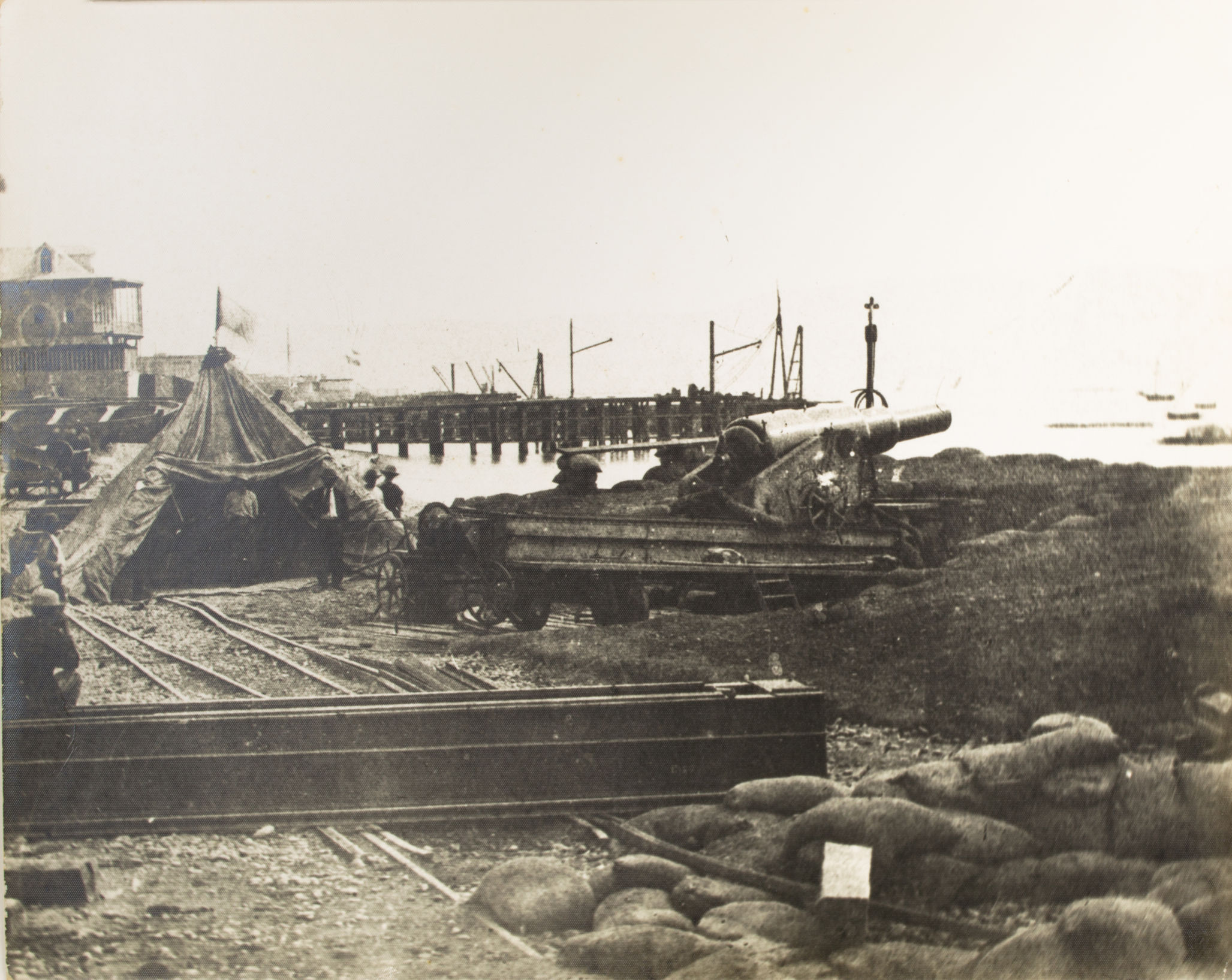 Cañón del Pueblo. Foto: Colección Elejade. PUCP